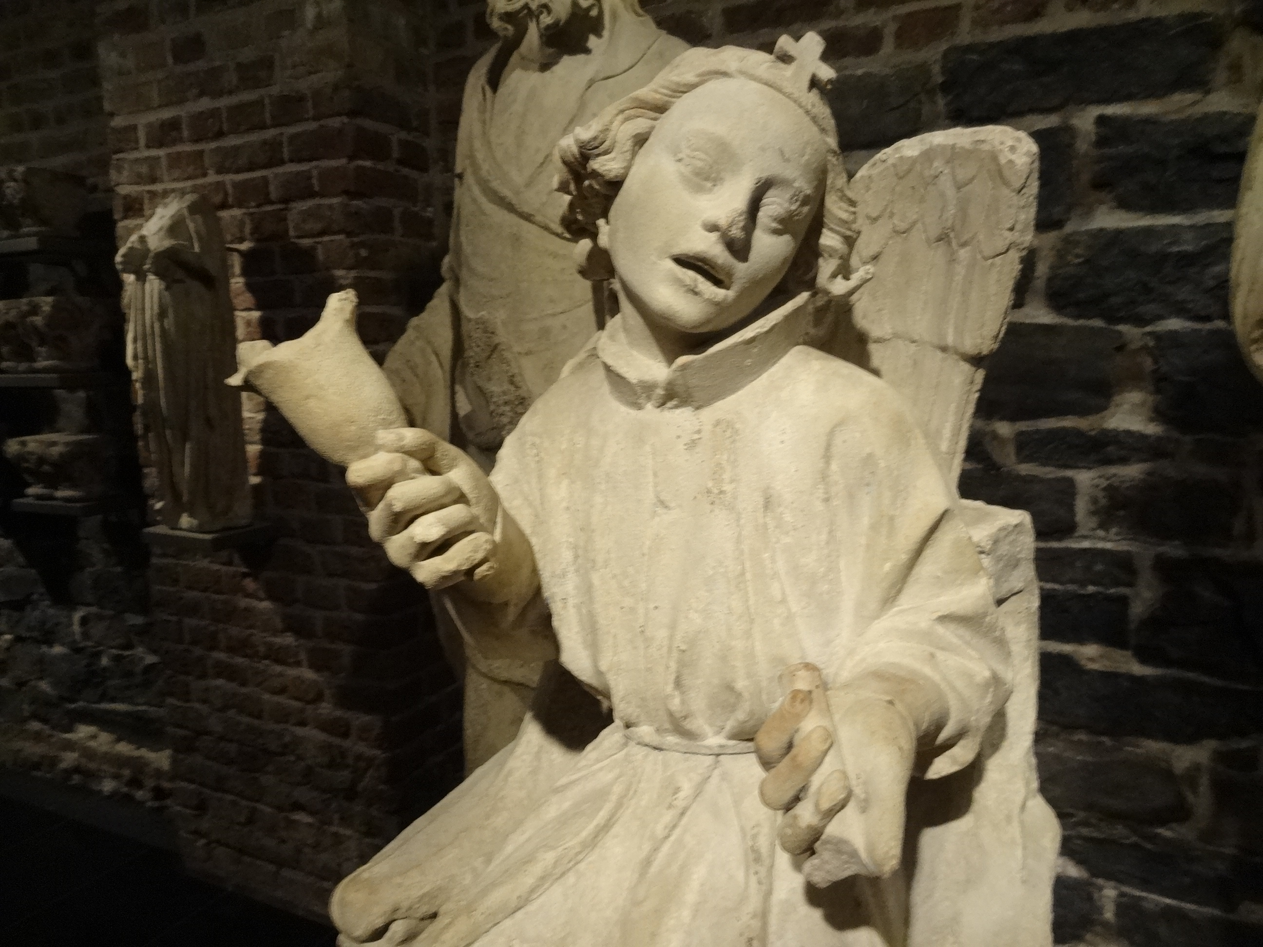 Steinfigur